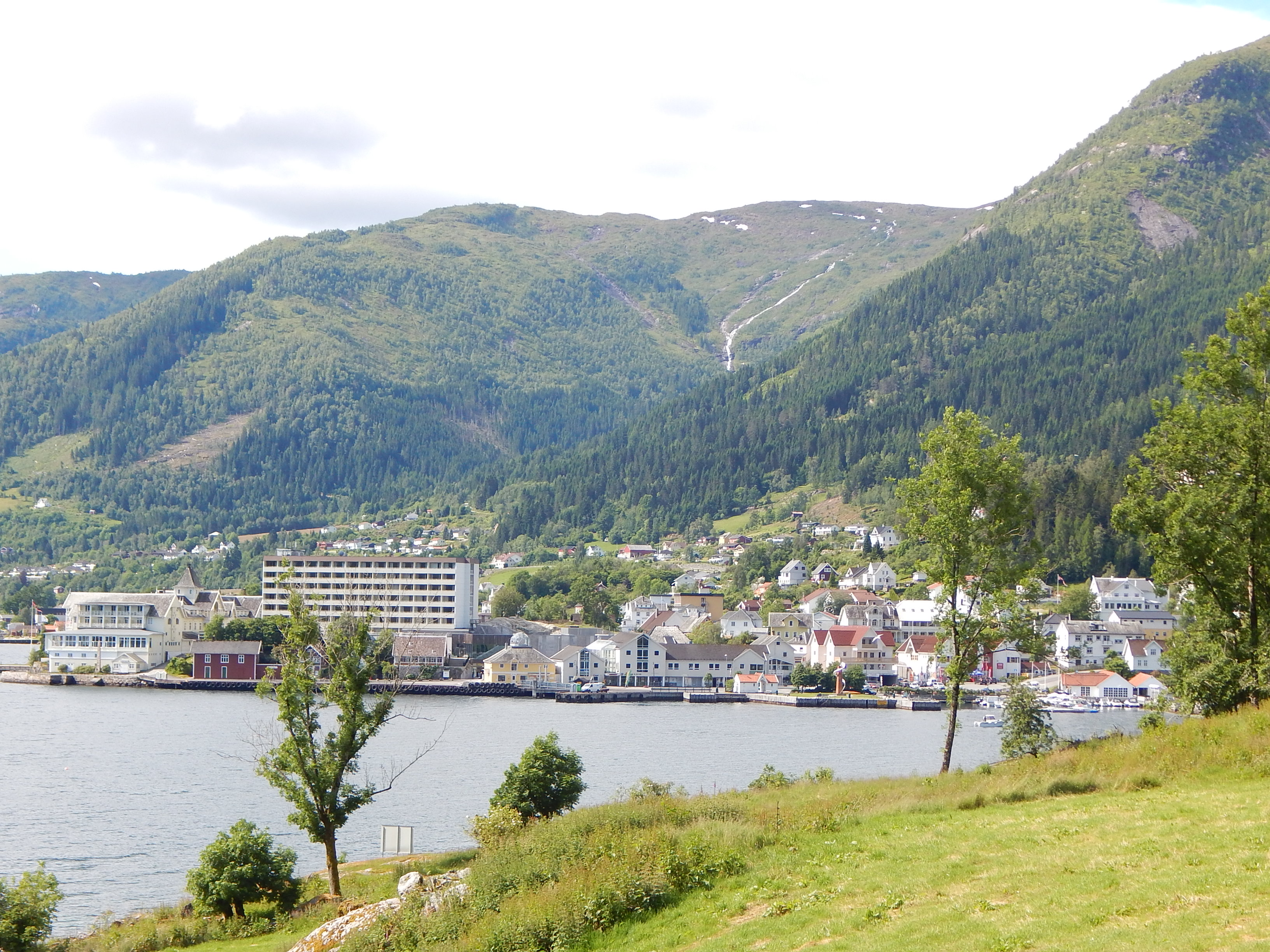 Balestrand tettsted sett over Esefjorden fra Tjugum kirke